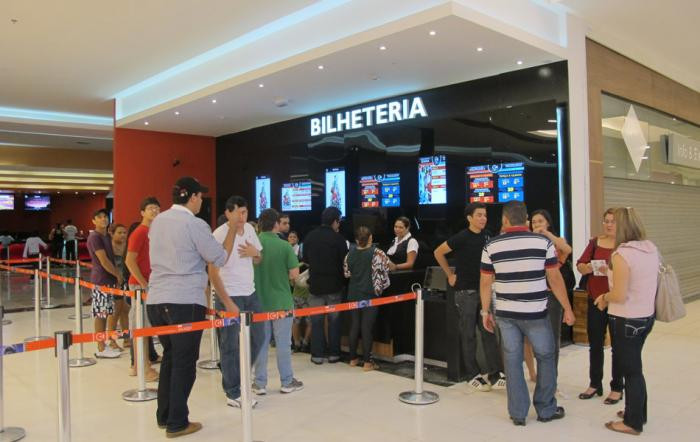 Bilheteria do Multiplex Via Verde de Rio Branco, AC